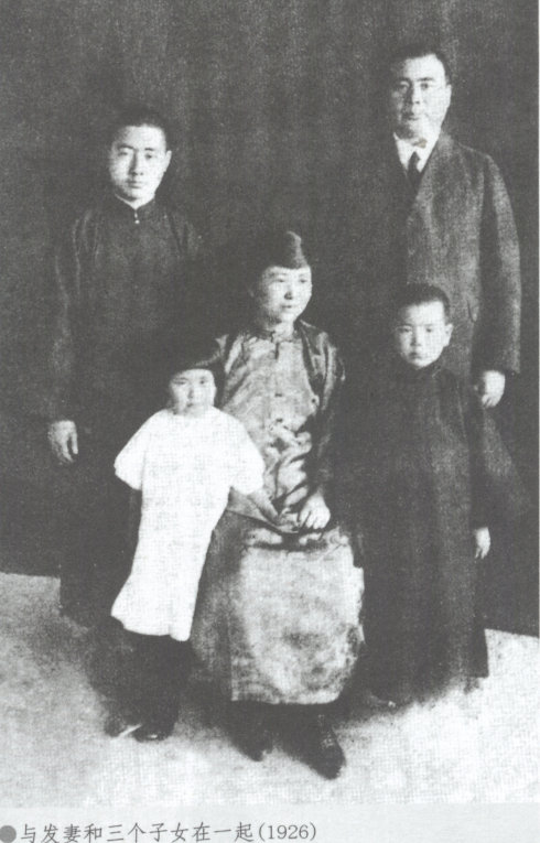 冯玉祥与发妻和三个子女在一起（1926年）